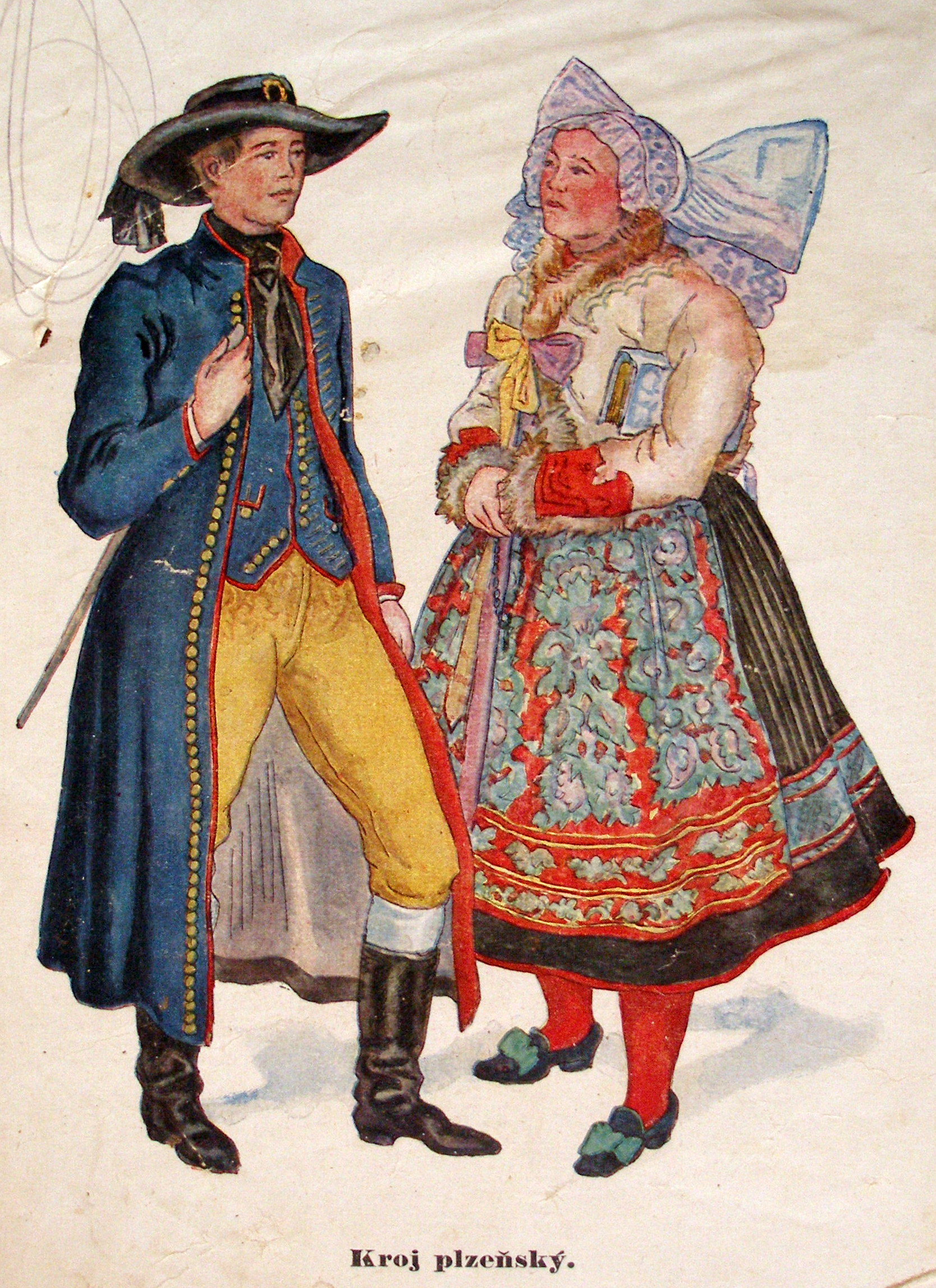 Digitalizovaný obrázok- detail z knihy Praktická hospodyňka napísanej v češtine, z obdobia existencie 1. Československej republiky. Rok vydania knihy 1929.